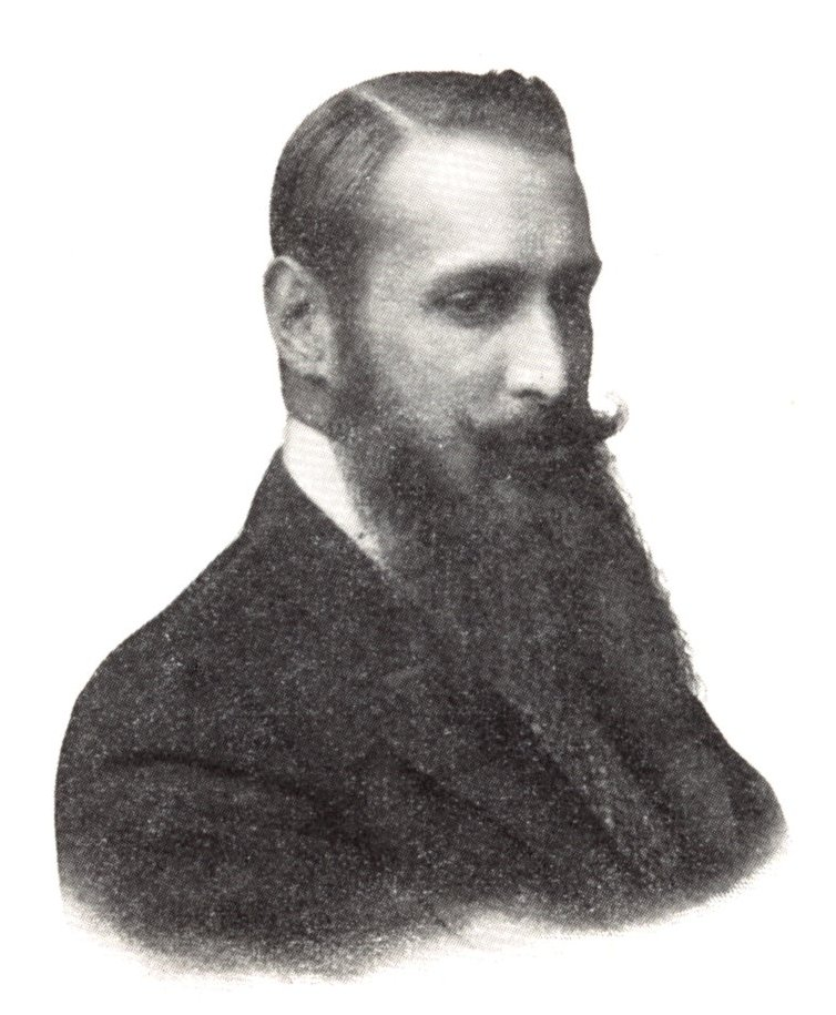 Károlyi Mihály (1875-1955) politikus, miniszterelnök